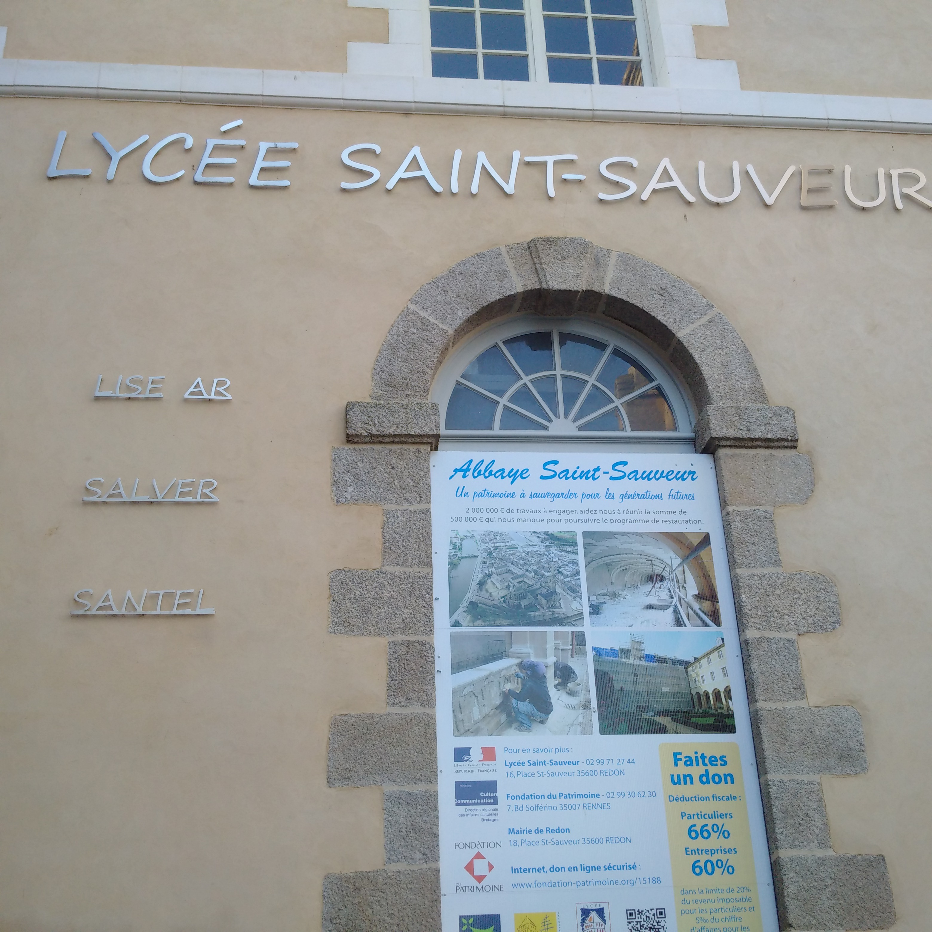 Dor degemer lise Sant salver e Redon.